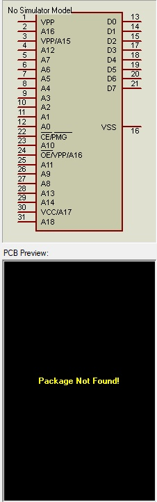 کتابخانه نرم افزار پروتئوس